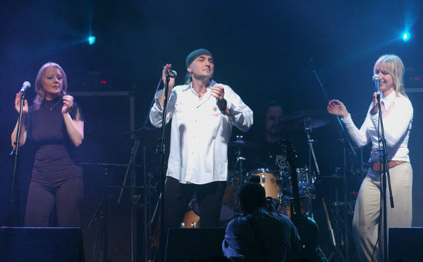 Koncertkép a Kormorán együttesről (balról jobbra: Tóth Renáta, Mr. Basary, Géczi Erika). Gödöllő.